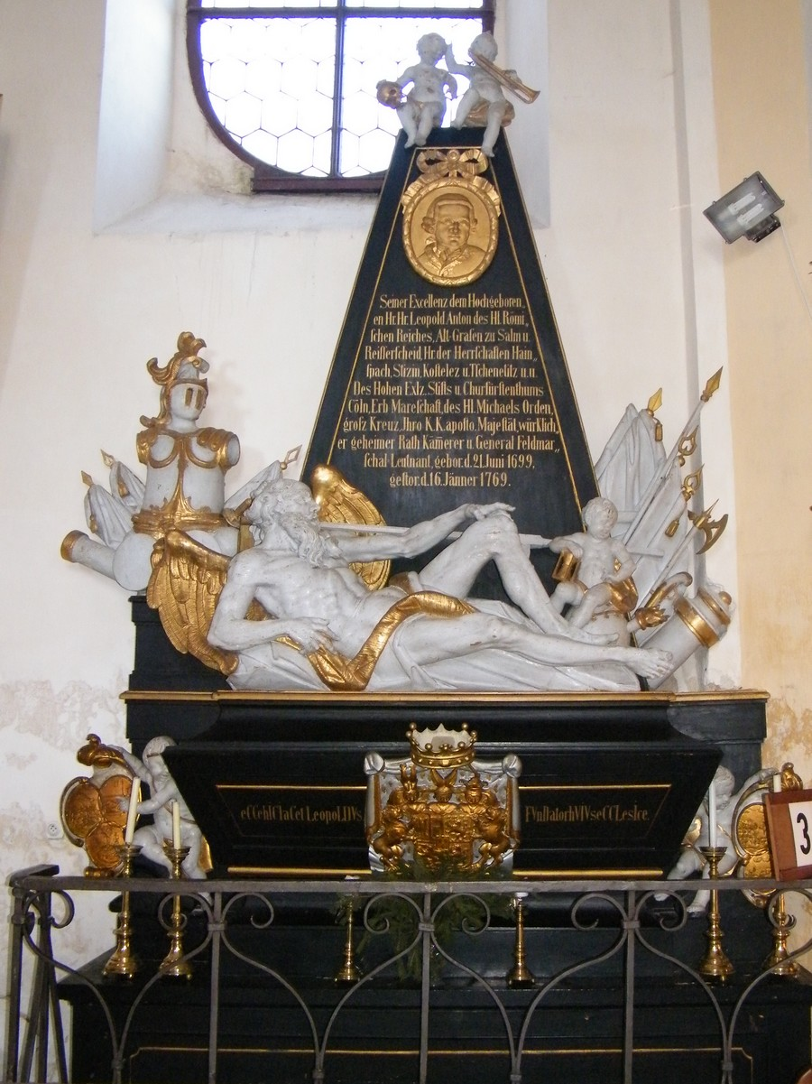 Náhrobek Leopolda Antonína Salm-Reifferscheidta v kostele Nanebevzetí Panny Marie ve Vilémově